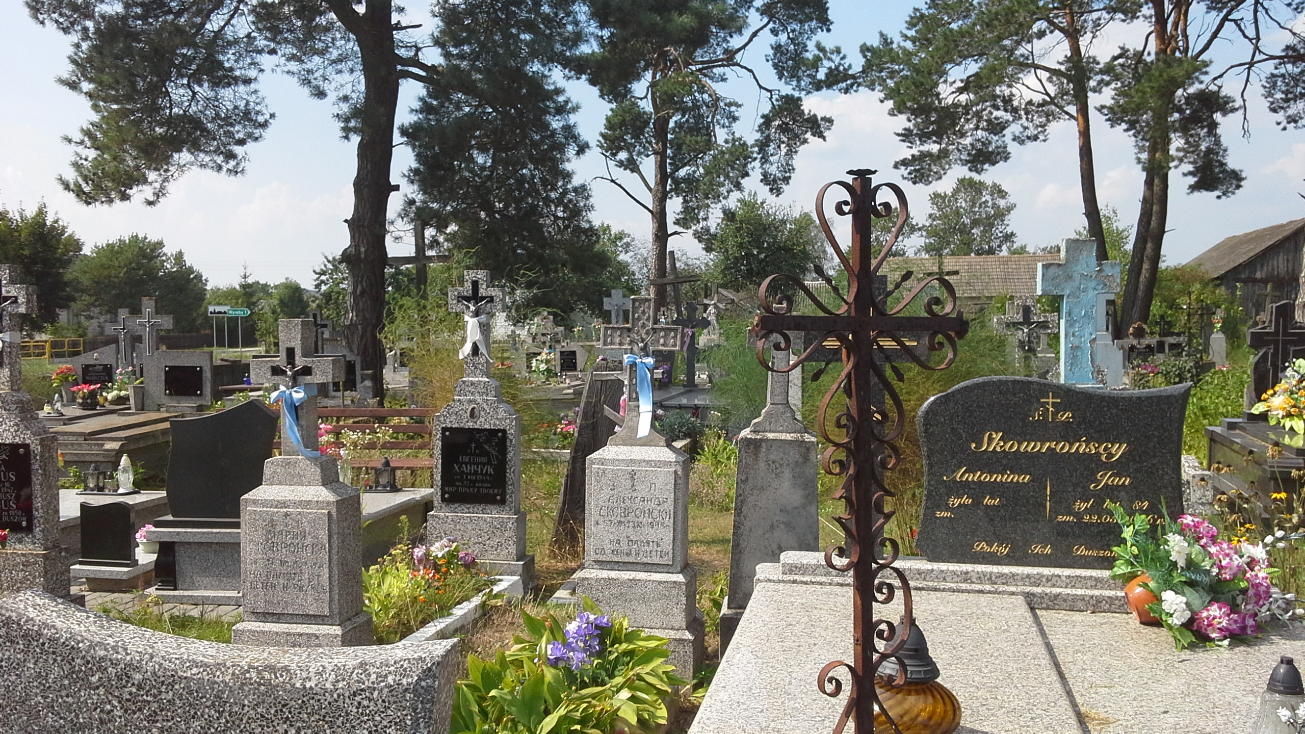 Widok ogólny cmentarza w Czarnej Cerkiewnej